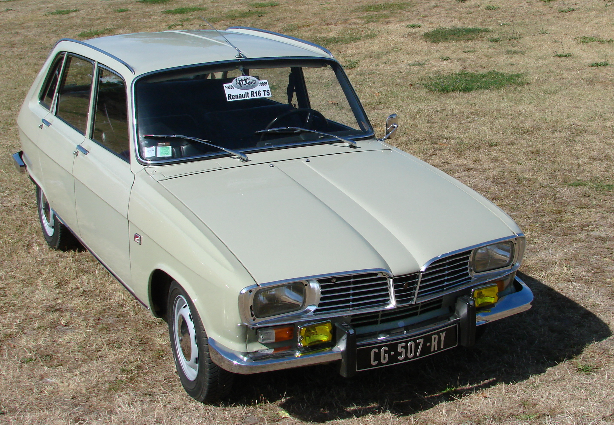 Renault 16 TS en 2012 aux journées du patrimoine de Blaye